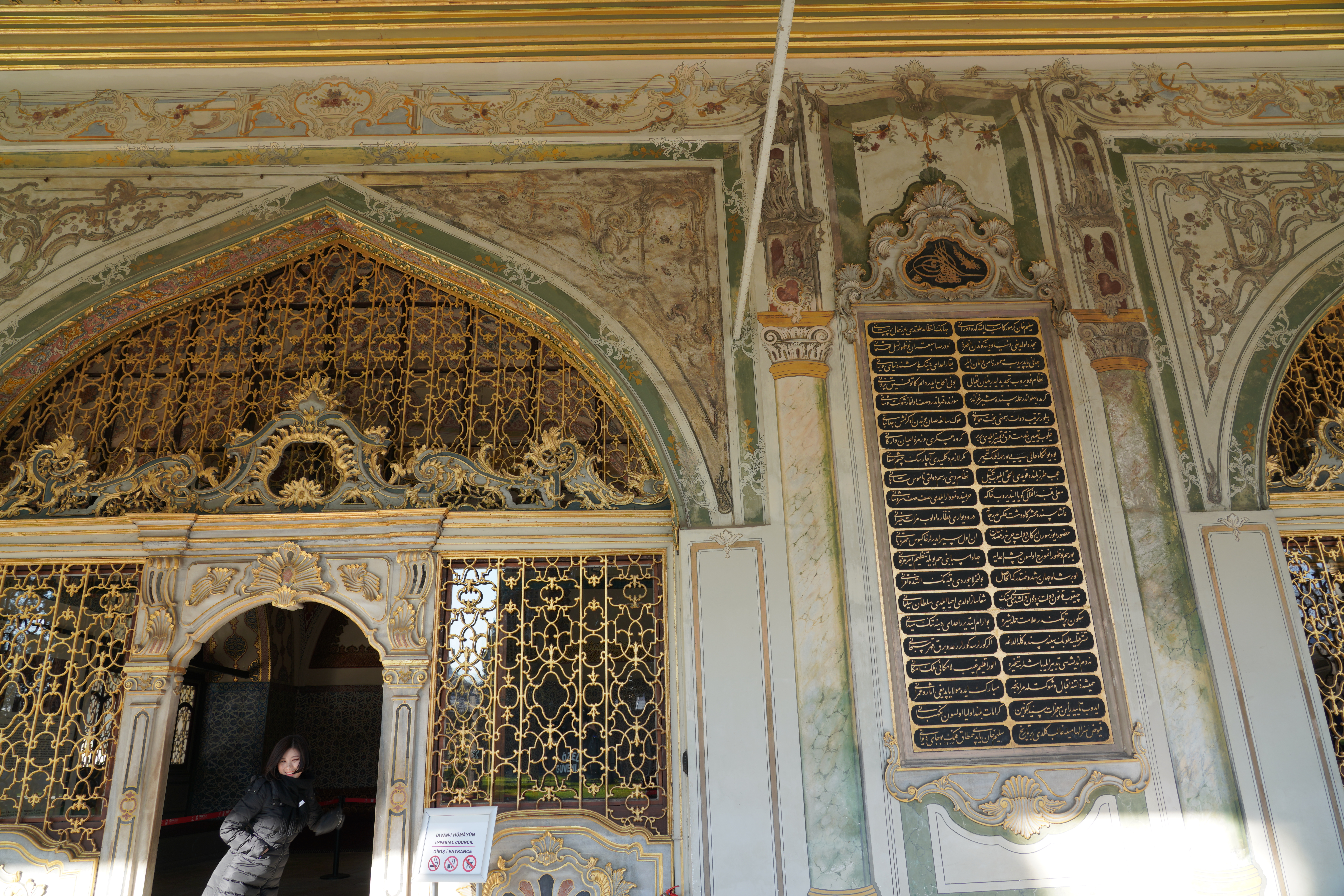 20180115_Topkapi_8030